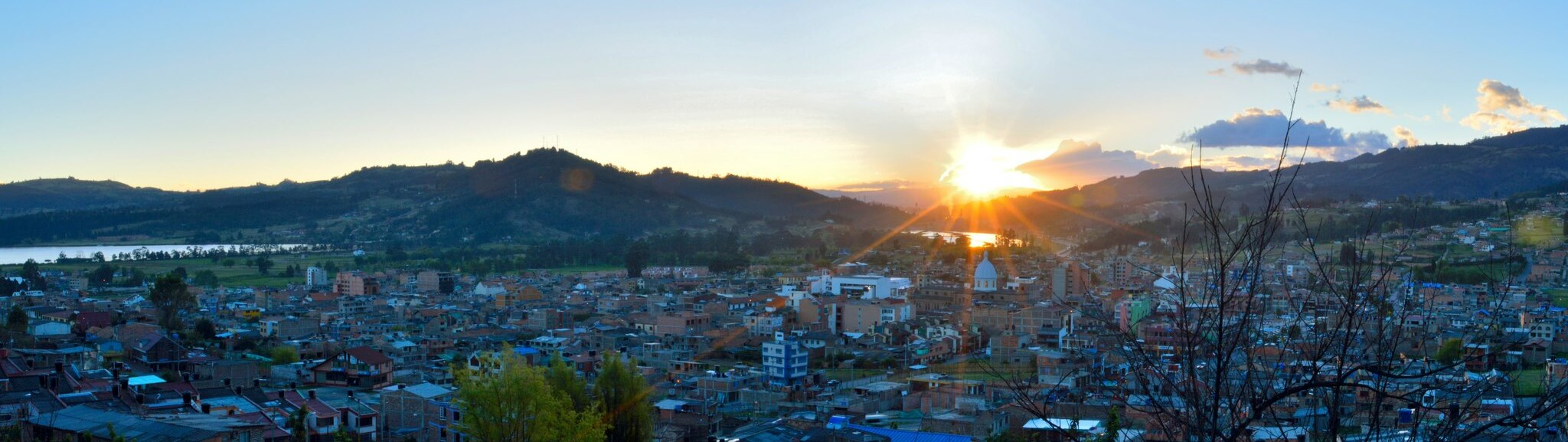 Tomada desde uno de o cerros paipanos con un bello atardecer de fondo